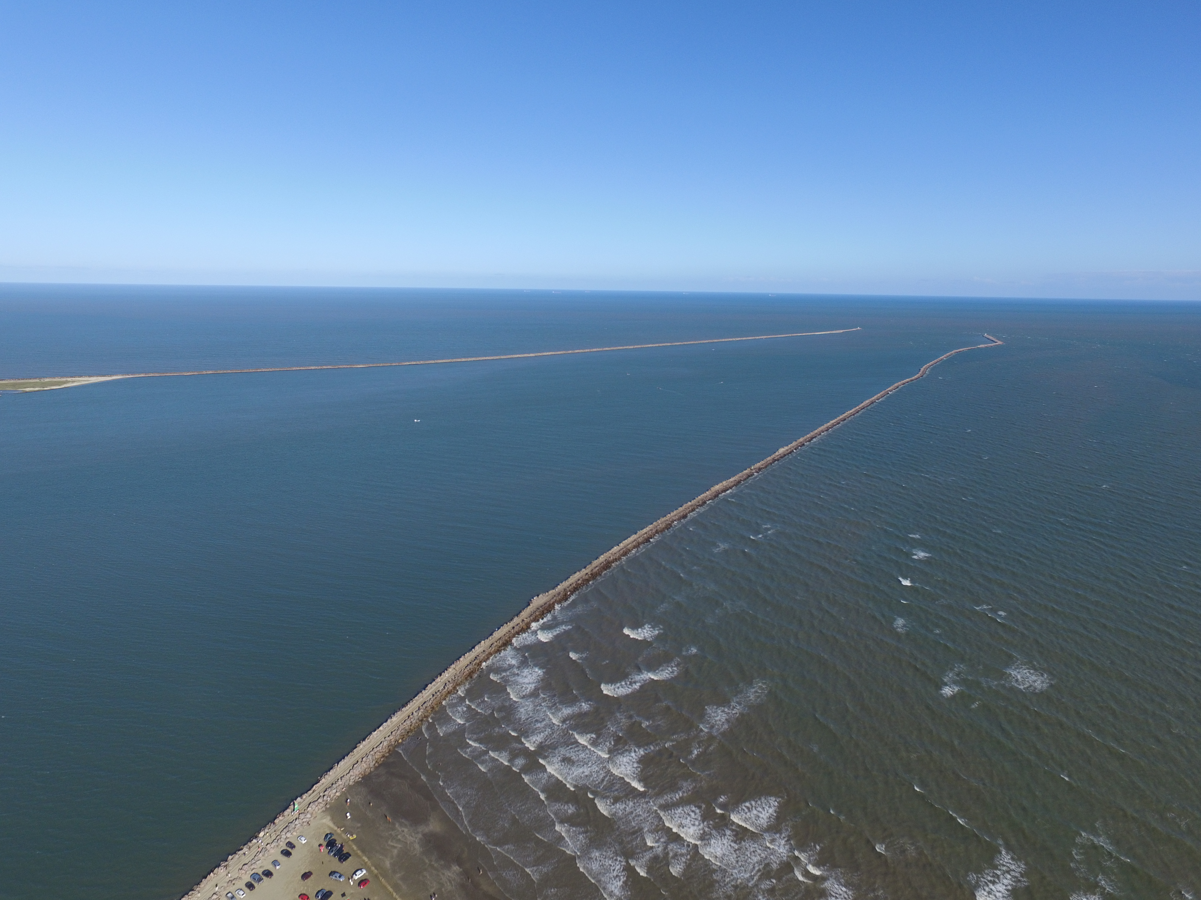 Vista dos Molhes da Barra em Fevereiro de 2016